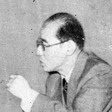 『録音機と教育活動』（日本放送教育協会編、1952年刊）における、宮原誠一との対談時の写真